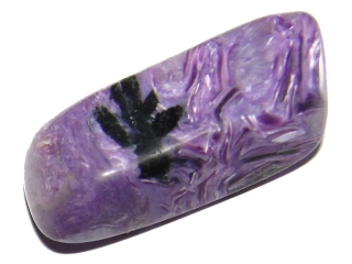 czaroit ze wschodniej Syberii, Rosja